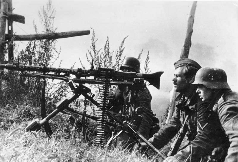 Im mittleren Frontabschnitt im Raum Orel war eben ein erfolgreicher Gegenangriff durchgeführt worden. Nun ist das SMG in Stellung gegangen und beobachtet gespannt die Bewegungen des Feindes. PK-Aufnahme: Kriegsberichter Lachmann 27.8.42